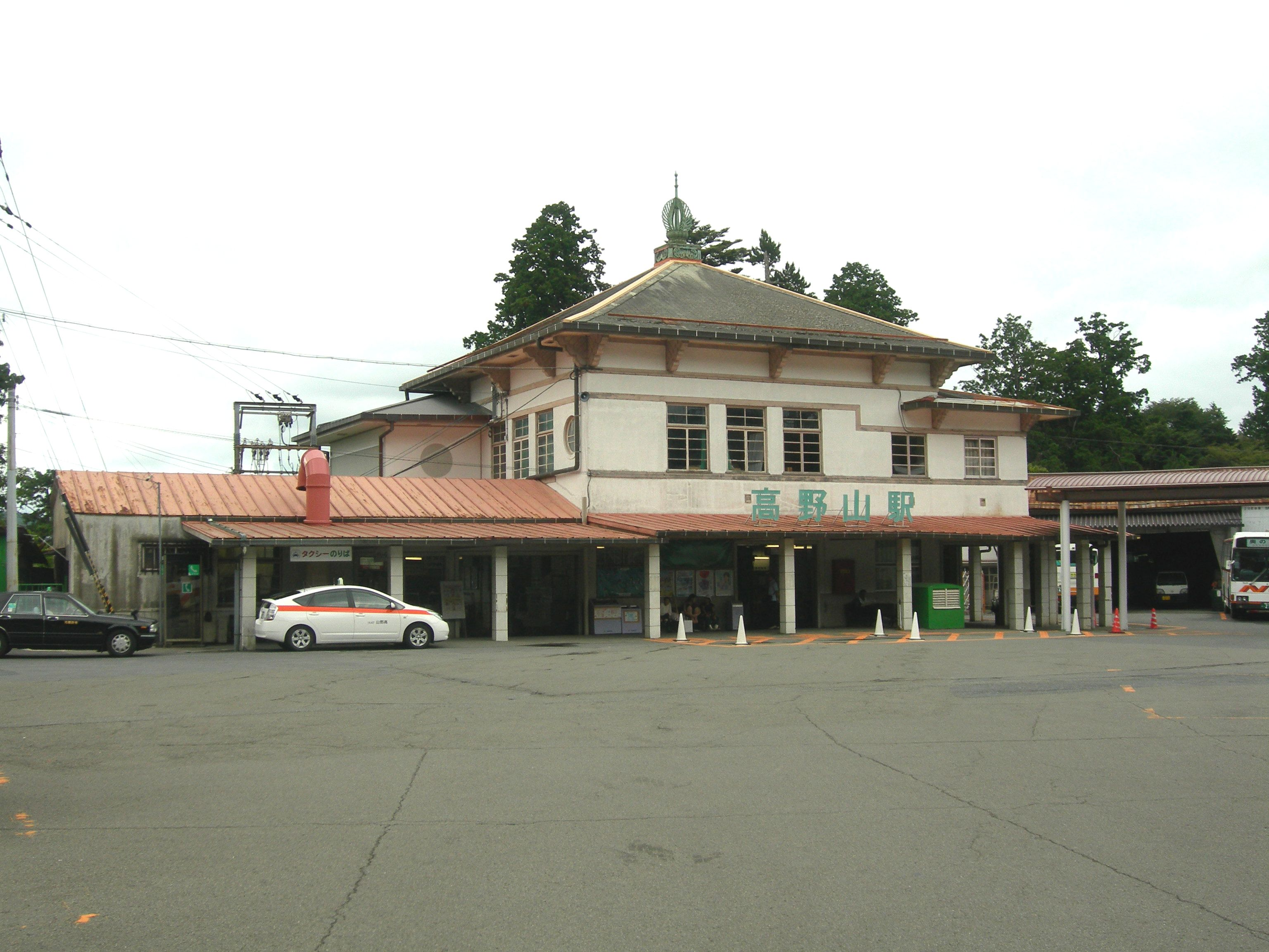 高野山駅 (和歌山県)